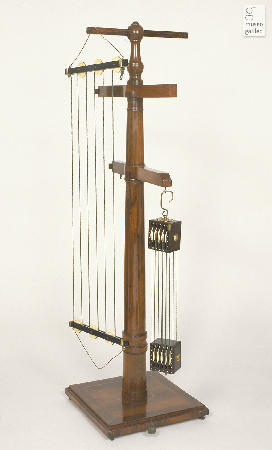 Polispasto della collezione del Museo galilei